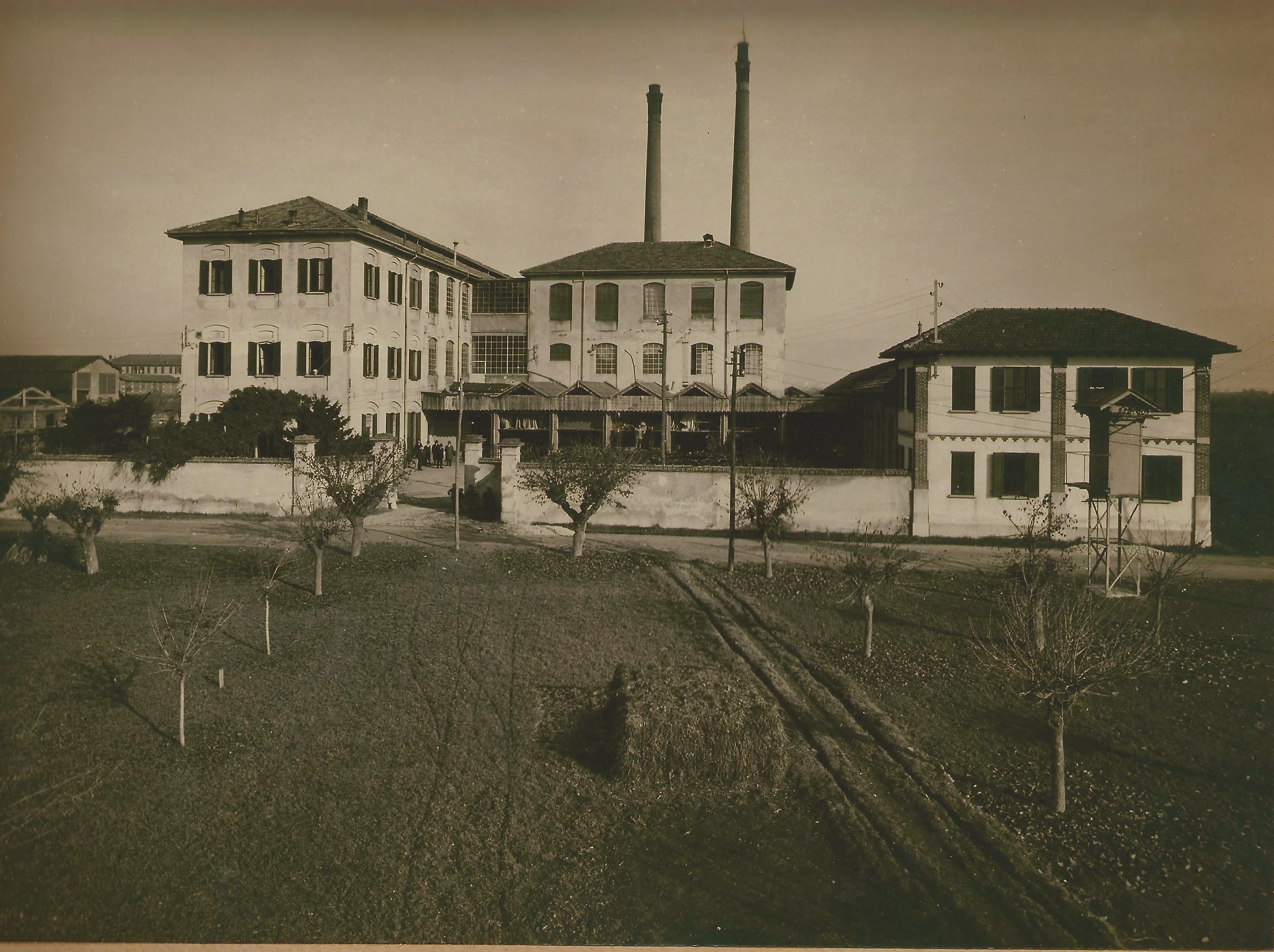 nel 1906